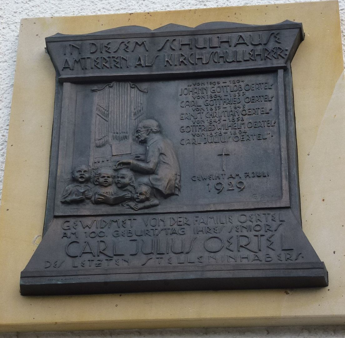 Tafel zur Erinnerung an die Kirchschullehrer in der ehem. Schule in Hänichen